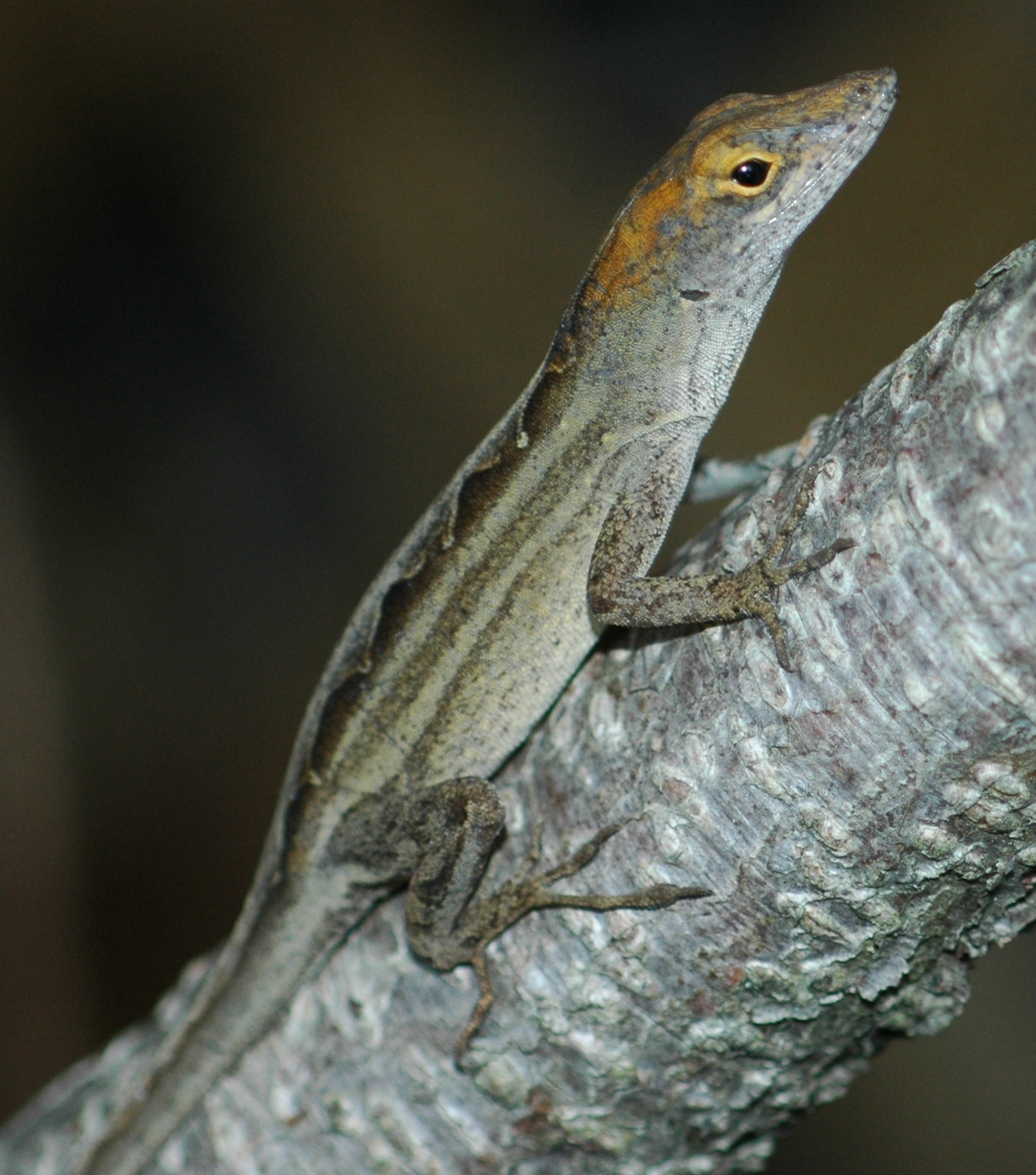 Anolis sagrei femelle en Floride